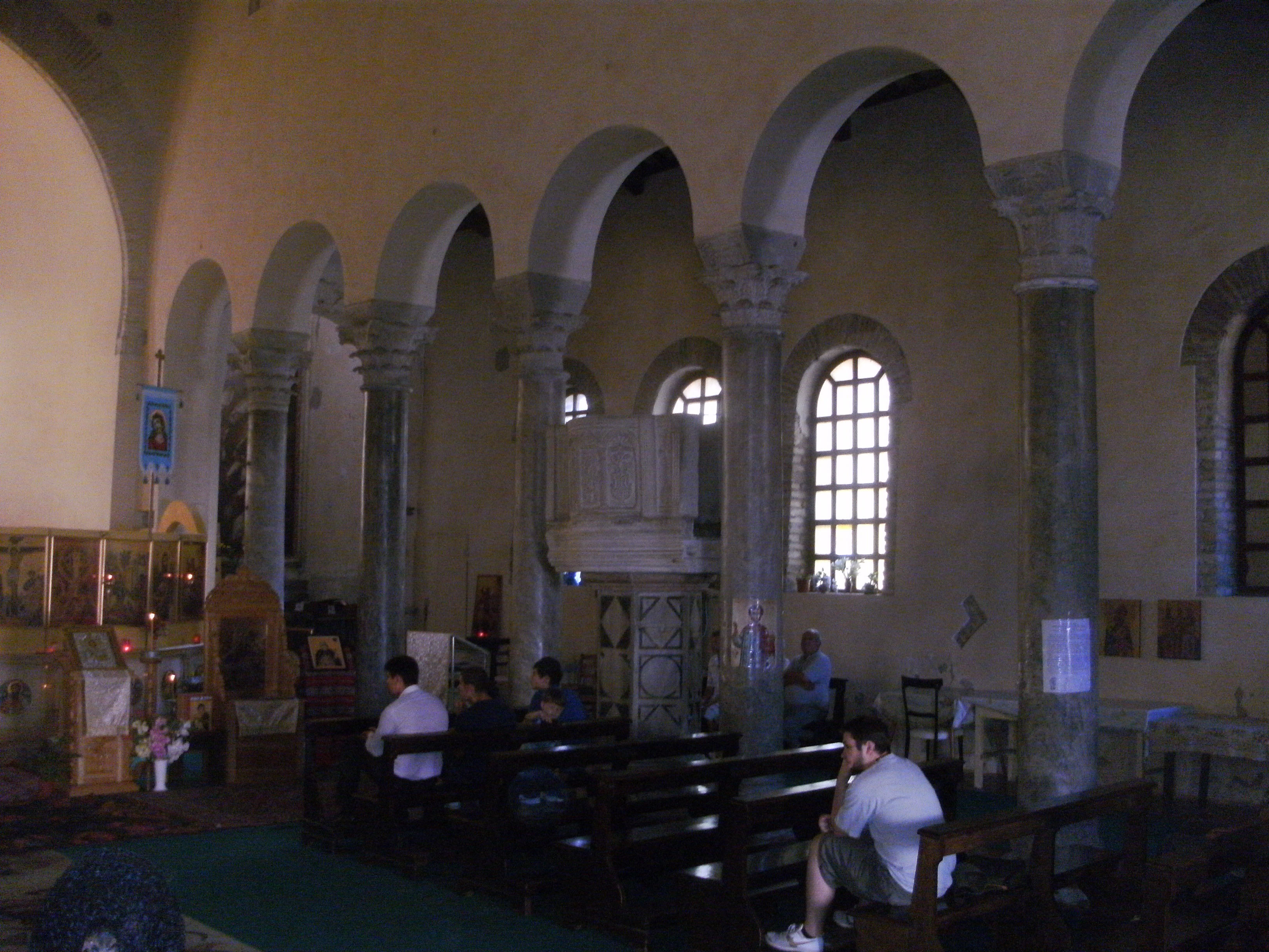 Ravenna, Kirche Spirito Santo von innen, Blick in Richtung des rechten Seitenschiffes